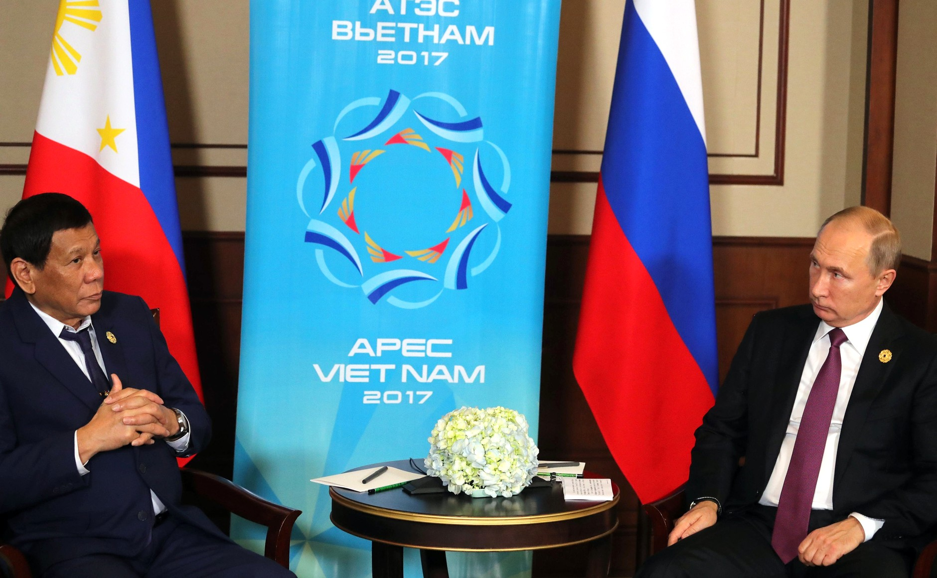 Встреча с Президентом Филиппин Родриго Дутерте.